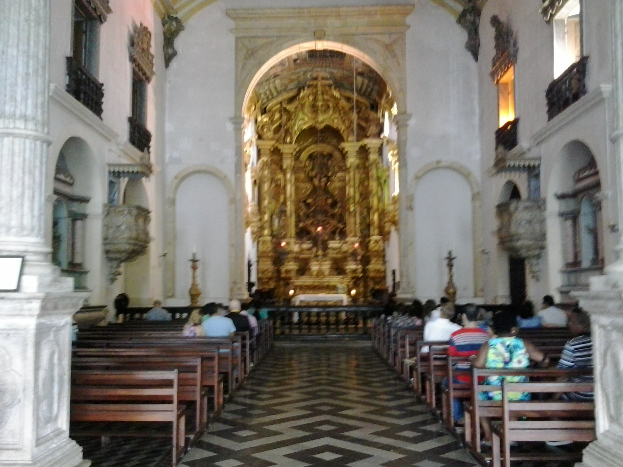 Olinda, Brasil